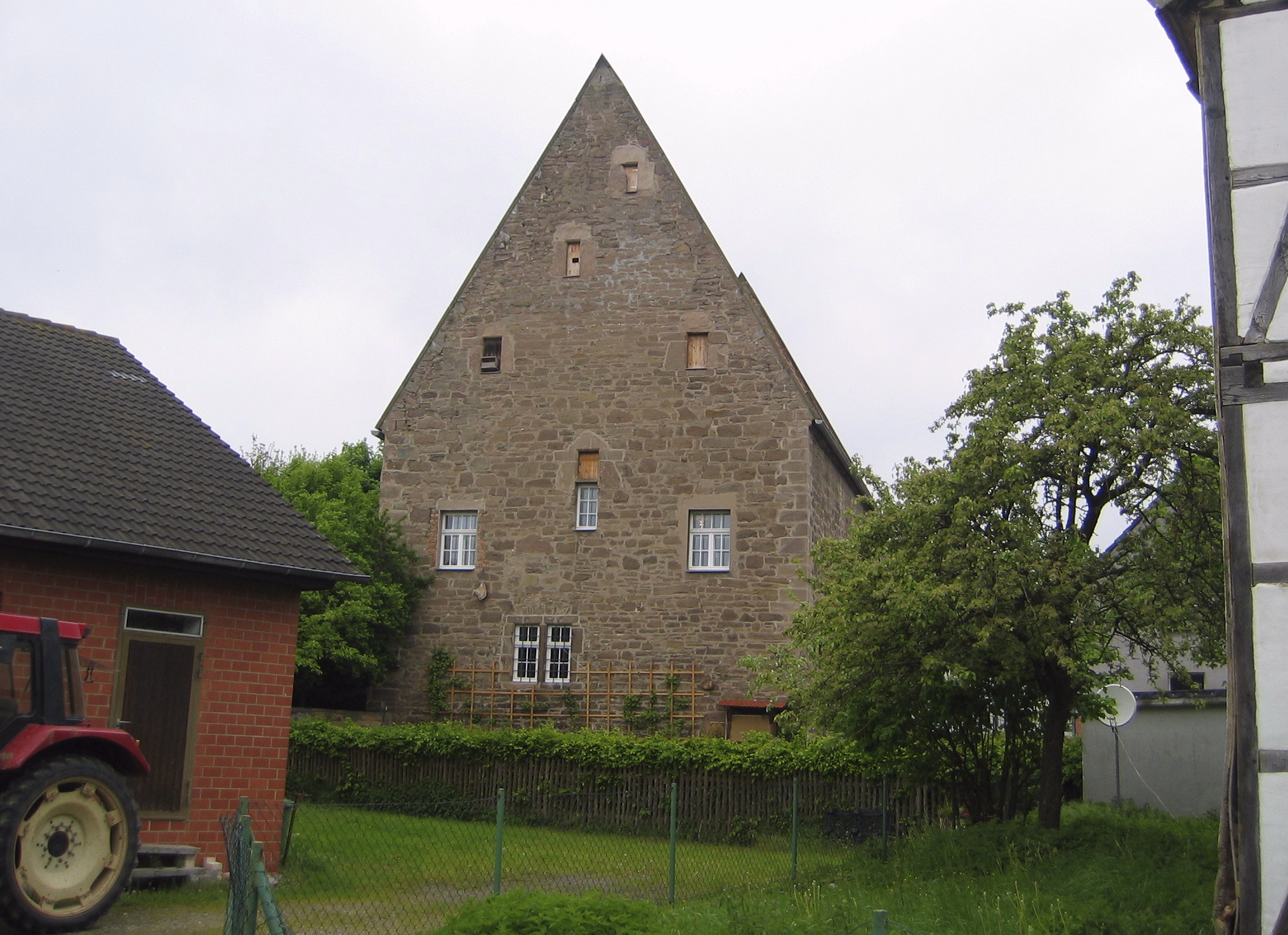 Das um 1300 gebaute „Steinerne Haus“ ist das älteste erhaltene Gebäude in der Stadt Borgentreich, Kreis Höxter, Nordrhein-Westfalen, Deutschland. Ab 1406 diente das ehemals dem Hof des Klosters Hardehausen zugehörige „Zehnthaus“ den Zisterziensern als Kloster und Hauptsitz ihrer Niederlassung. Mit der Säkularisierung 1803 ging das Steinerne Haus in den Besitz des preußischen Staates über, der es 1848 an die Stadt Borgentreich verkaufte, in deren Eigentum es sich bis heute befindet. Von 1920 bis 1952 wurde es als Schule genutzt, danach bis 1977 teils zu Wohnzwecken vermietet. Anschließend stand das historische Gebäude leer und verfiel zunehmend. 1985 wurde es als Baudenkmal eingetragen. Nach Sanierung und innerem Umbau 1999 wurde das Haus zum Sitz der Landschaftsstation im Kreis Höxter sowie der Bürgerinitiative „Lebenswertes Bördeland und Diemeltal“, des Naturkundlichen Vereins Egge-Weser und des Aktionsbündnisses „Tag der Regionen“ (Info).